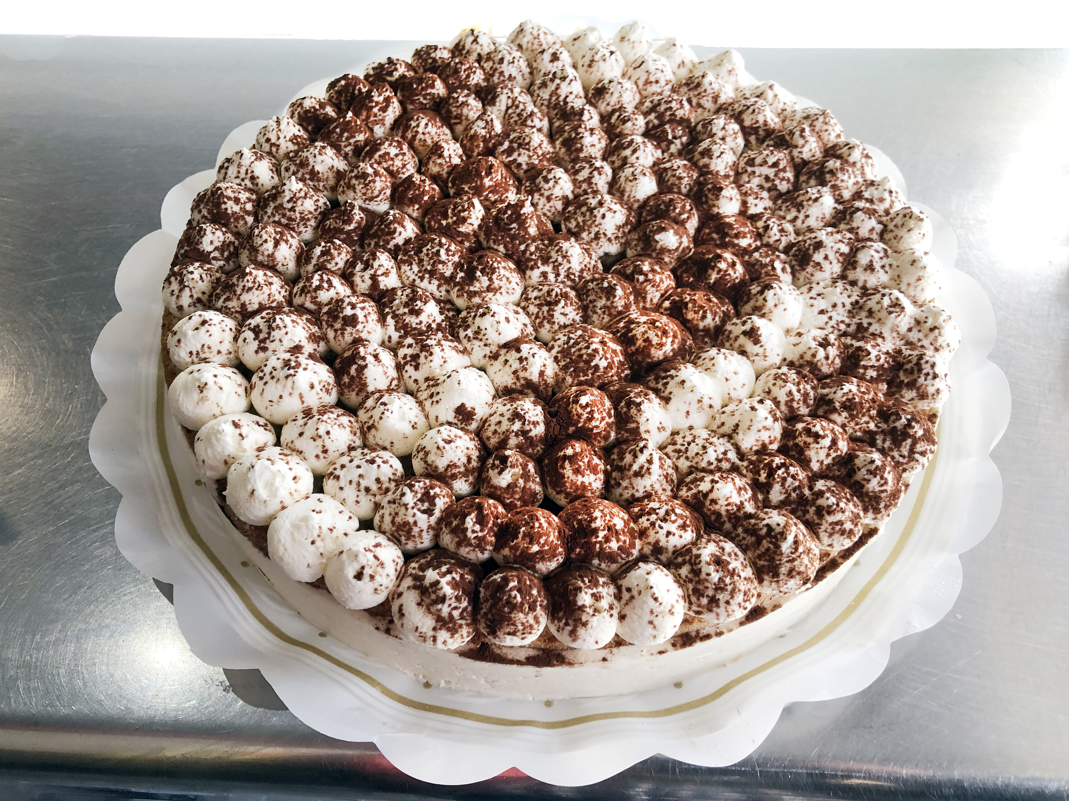 Tarta de Tiramisu